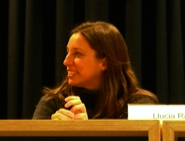 cropped image of File:2015 Destapats 2a Edició.jpg